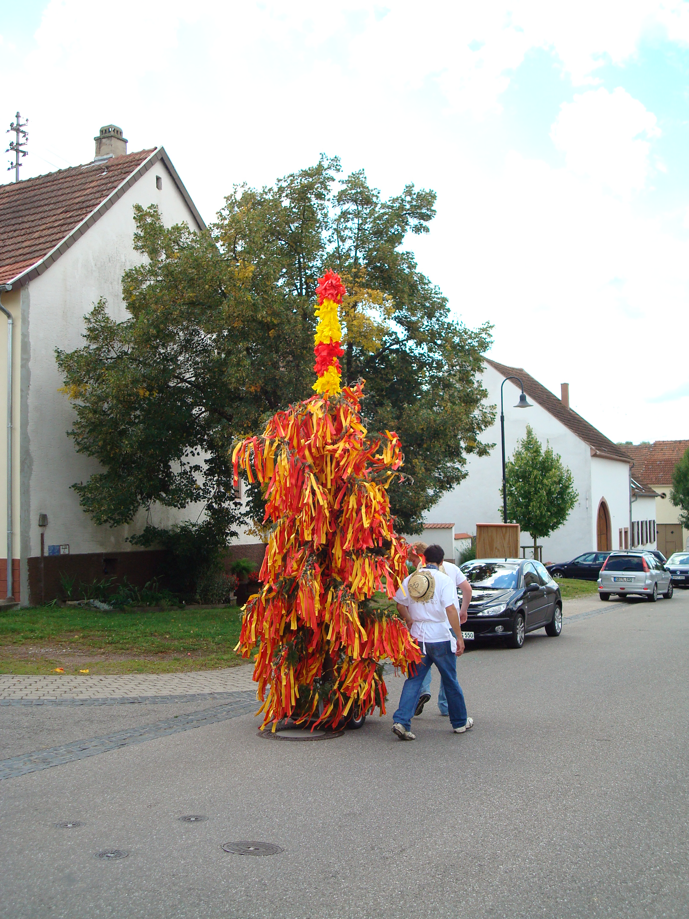 Gelbach, Kirwestrauß 2007 - Brauchtum zur Zeltkirb Niedergailbach